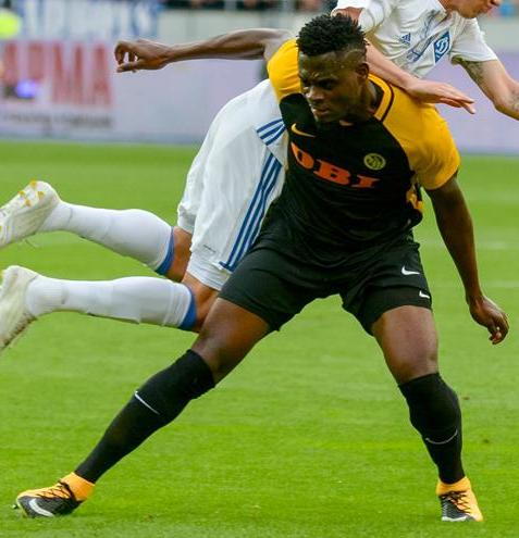 Kasim Adams Nuhu beim CL-Qualifikations-Hinspiel Dynamo Kiew gegen BSC Young Boys